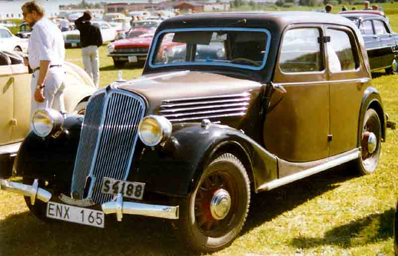 Renault Primaquatre Berline 1936